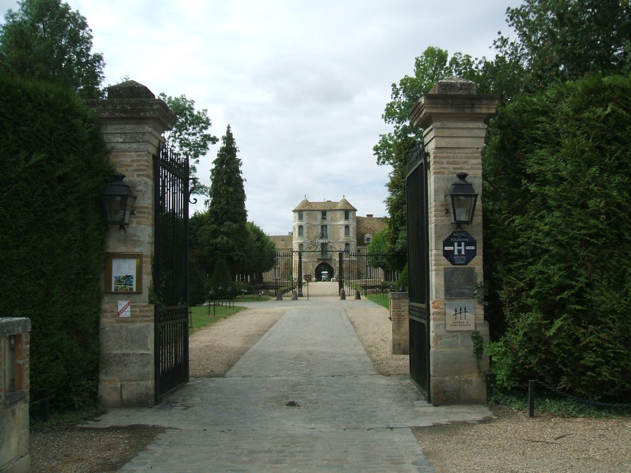 Eingangsbereich des Schlosses Launay in Villiers-le-Mahieu, Yvelines